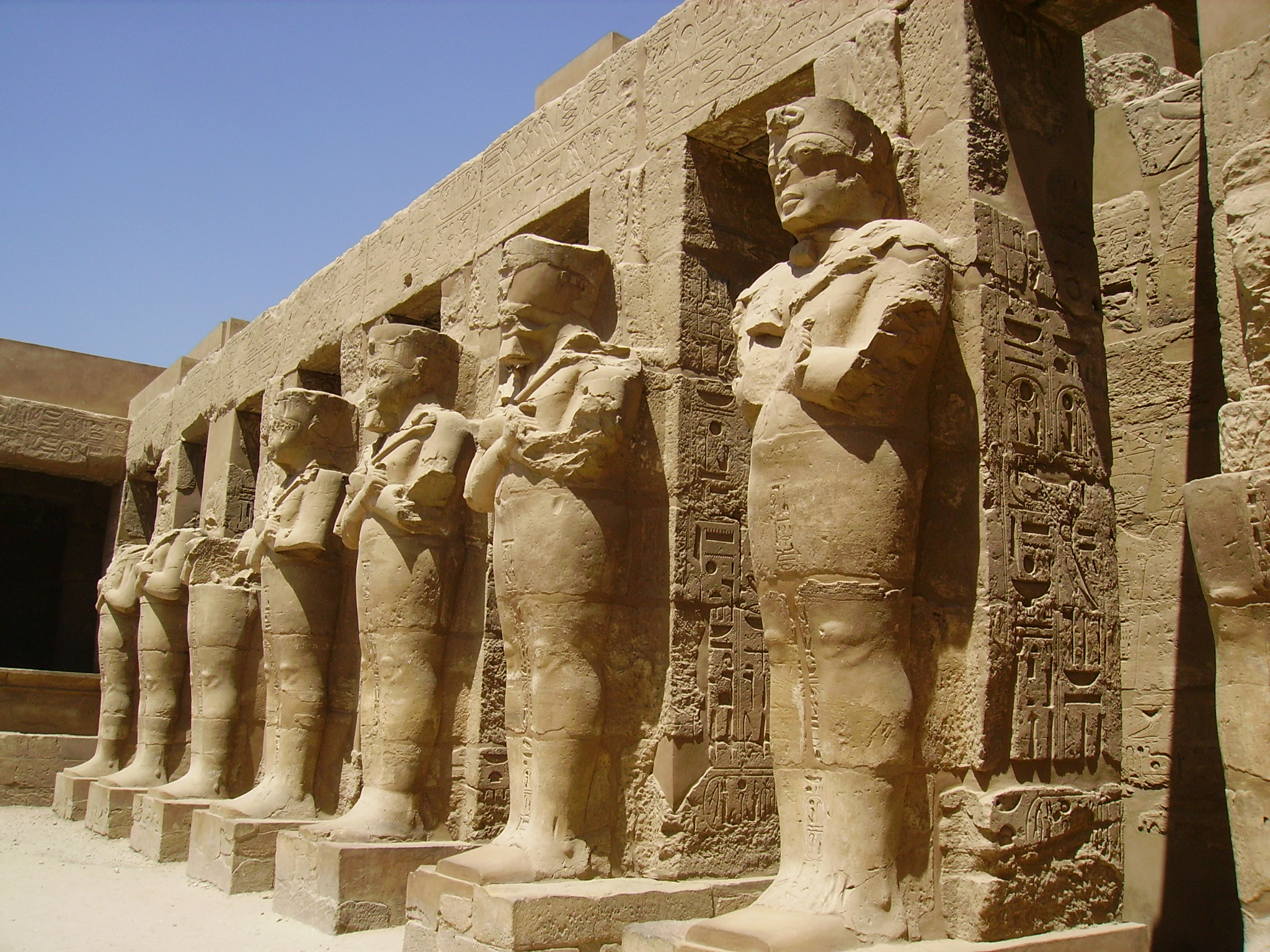 Karnak temple, Karnak, Egypt